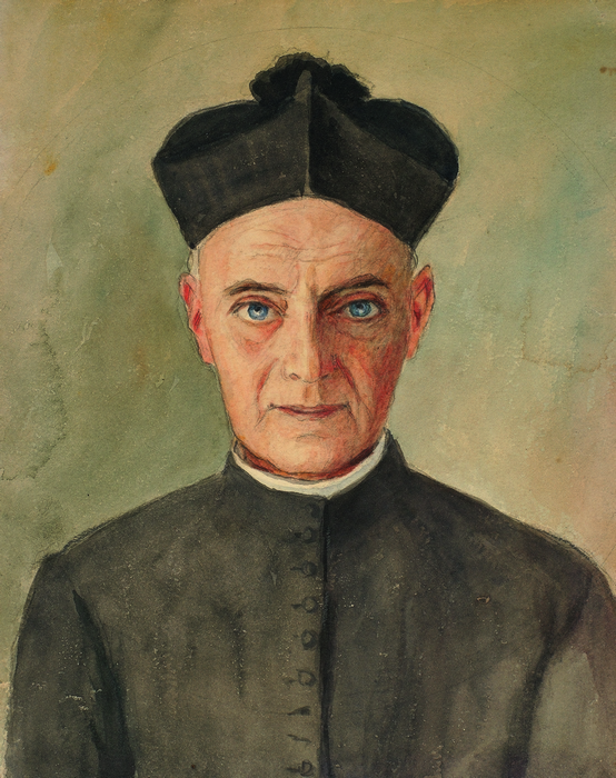 Автопортрет русского художника Петра Павловича Ганского, из коллекции Одесского художественного музея